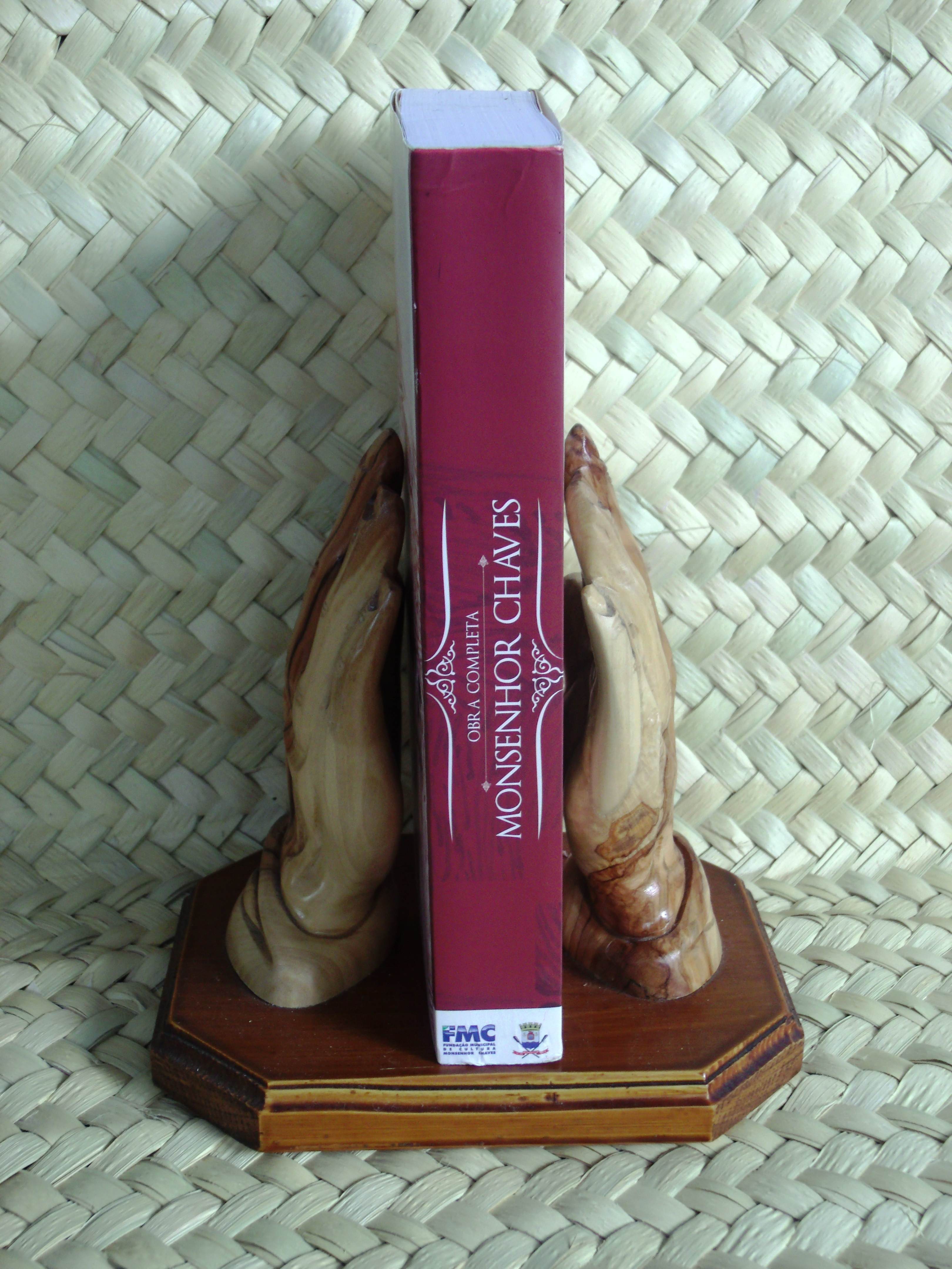 Mão em artesanato de madeira servido de bibliocanto de livro do historiador e sacerdote Joaquim Raimundo Ferreira Chaves.